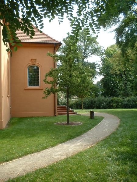 Neu gepflanzter Birnbaum neben der Dorfkirche von Ribbeck